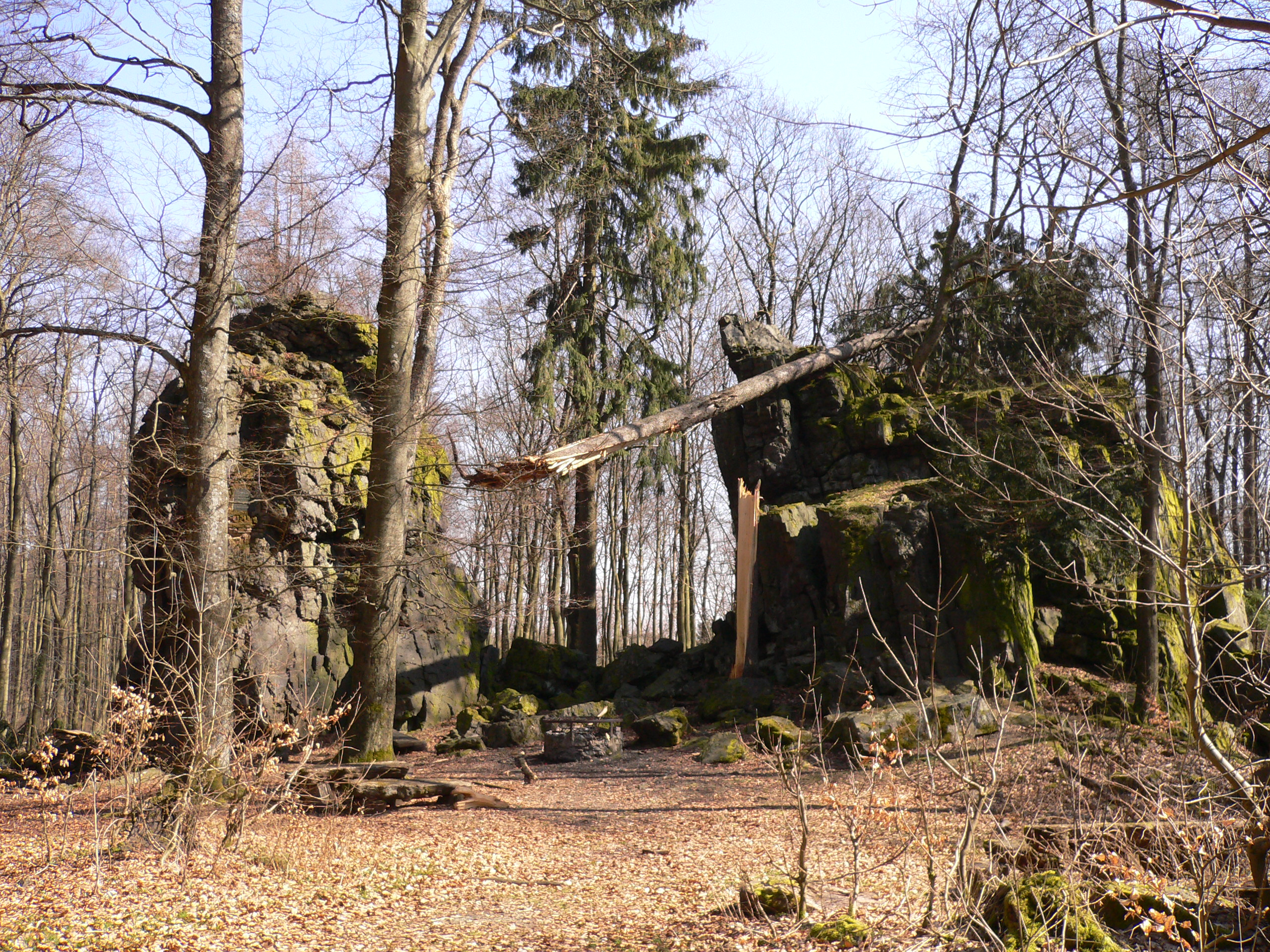 Wilhelmsteine nach dem Sturm